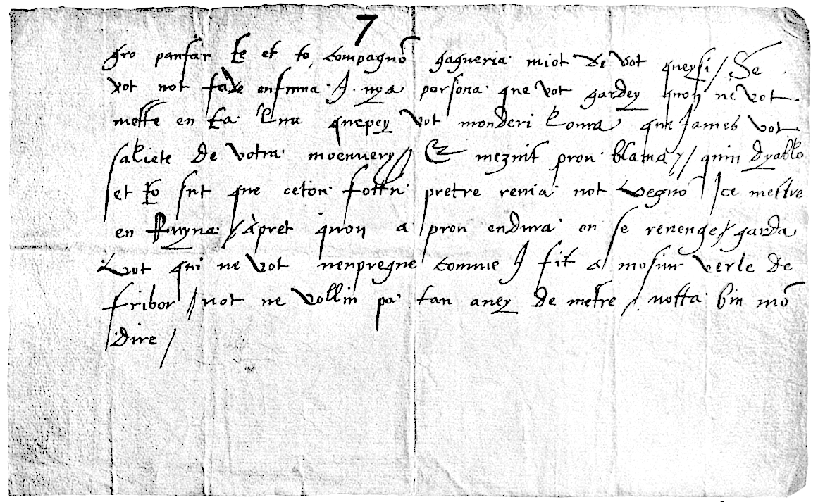 Texte placardé dans la cathédrale Saint-Pierre de Genève en 1547, rédigé en patois genevois et dénonçant la « tyrannie théocratique » instaurée par Jean Calvin. Original conservé aux Archives d'État de Genève.